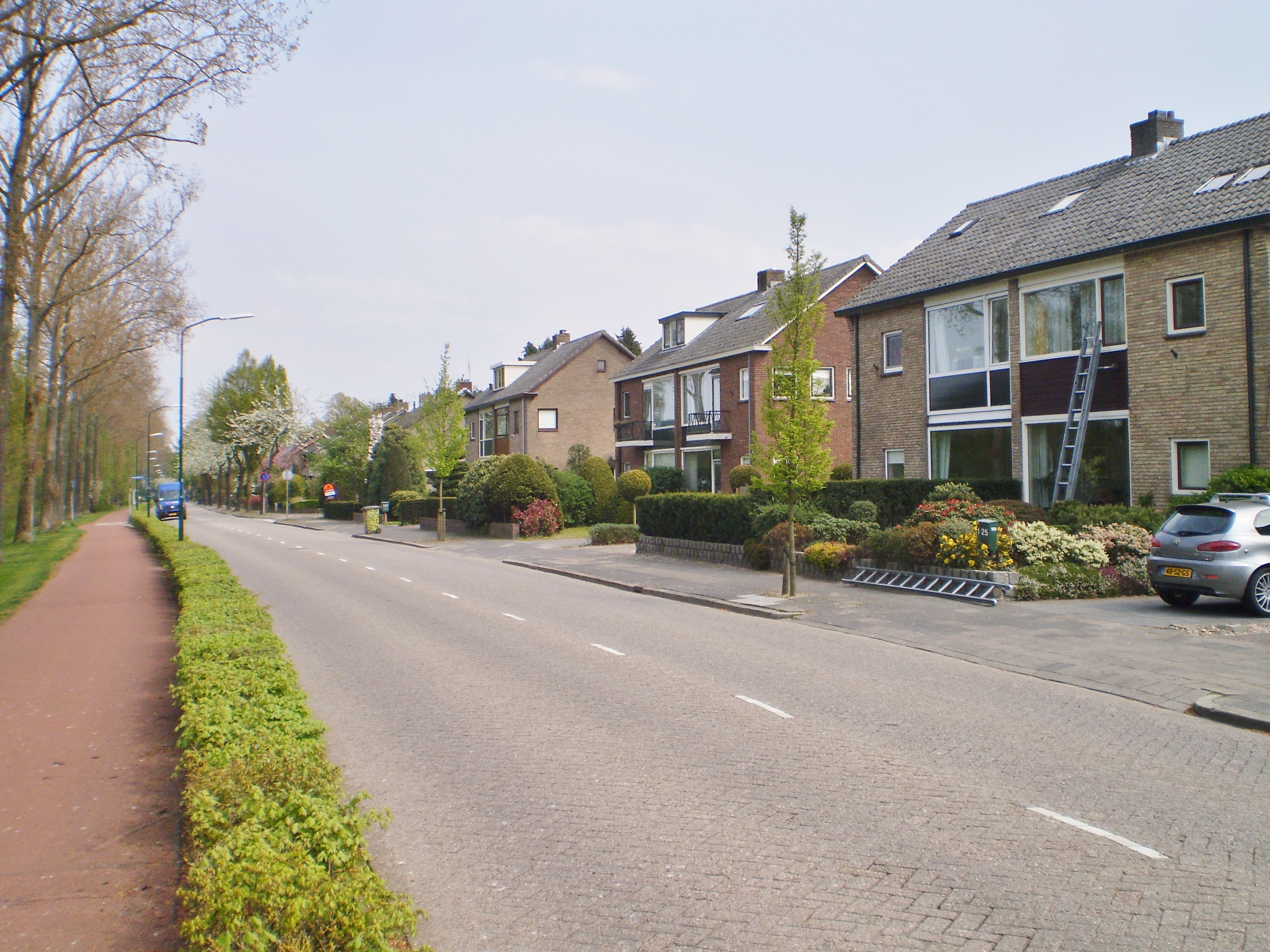 Met zicht op de A1